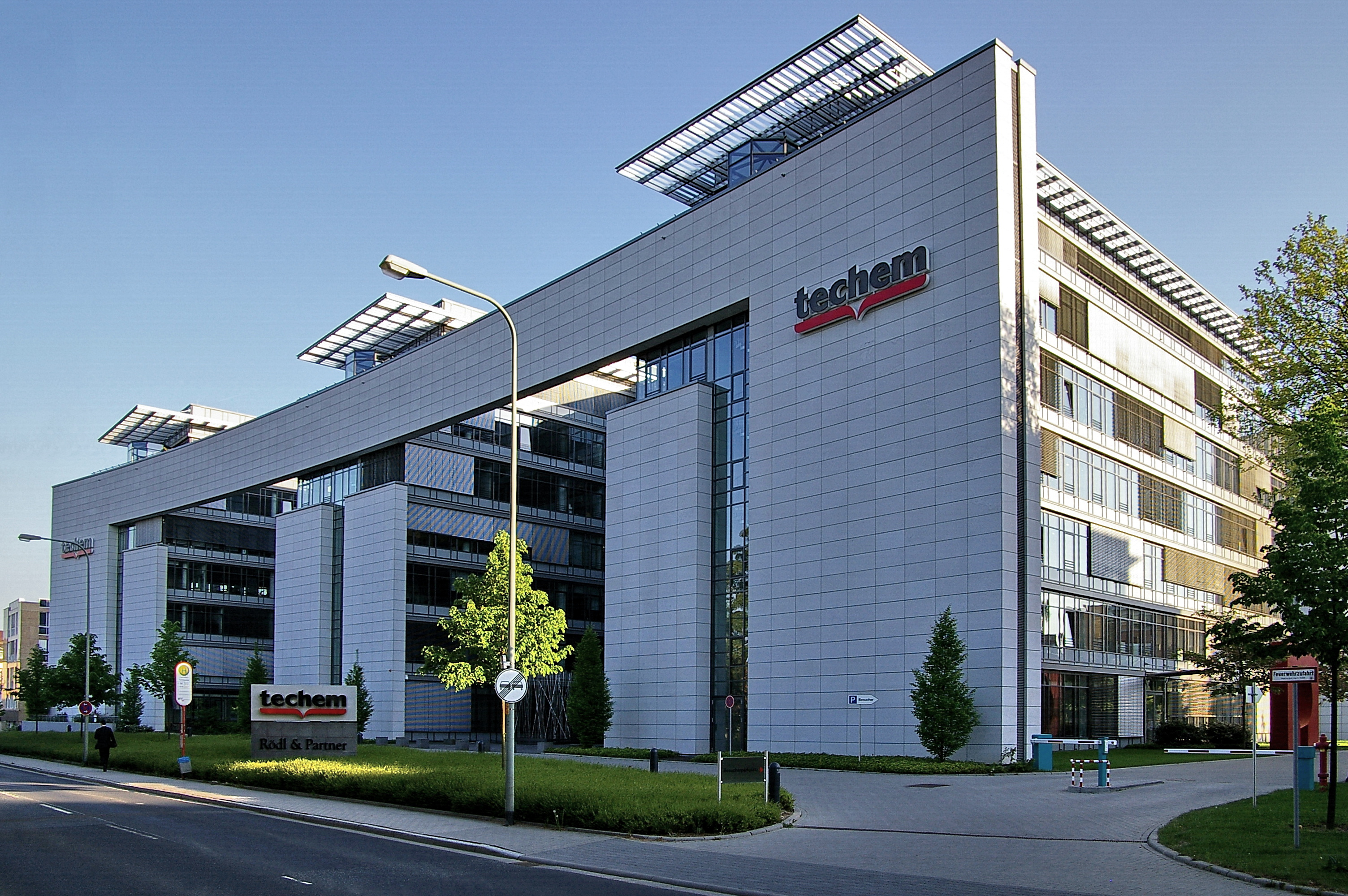 Hauptverwaltung der Techem AG in Eschborn auf der Hauptstraße